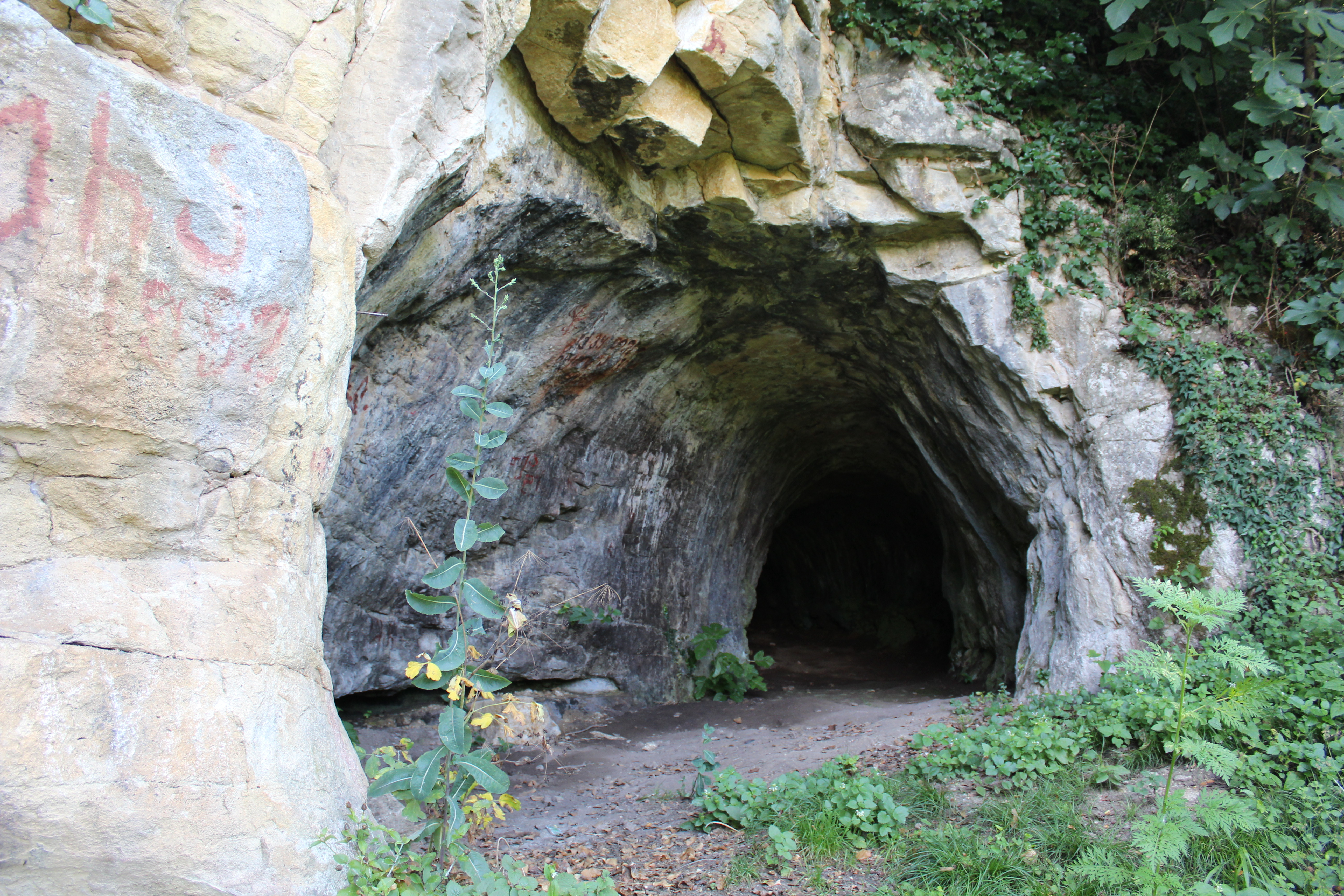 დევისხვრელი - ზედა პალეოლითის არქეოლოგიური ძეგლი